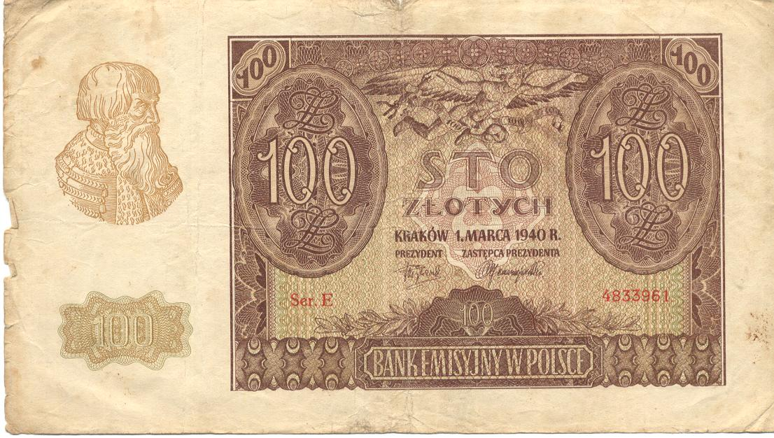 100 złoty = 50 Reichsmark